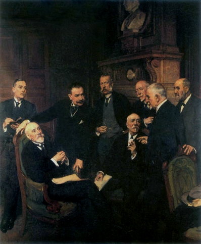 Herman Richir (1866-1942) Réunion du Conseil d'administration de la Banque nationale (1918) Huile sur toile, 230 x 195 cm Collections de la Banque nationale de Belgique